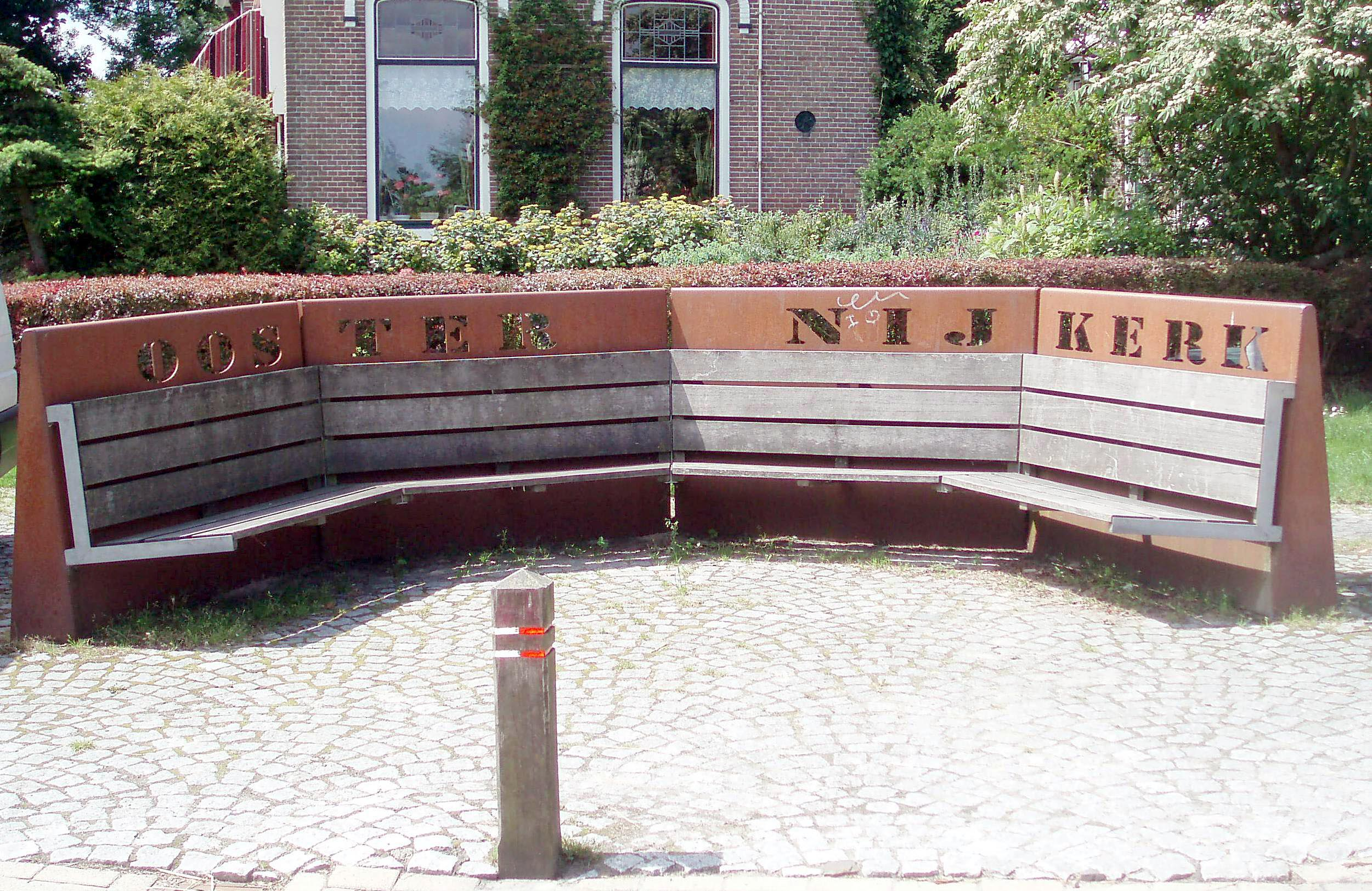 Ontwerper: Gunnar Daan, 1999